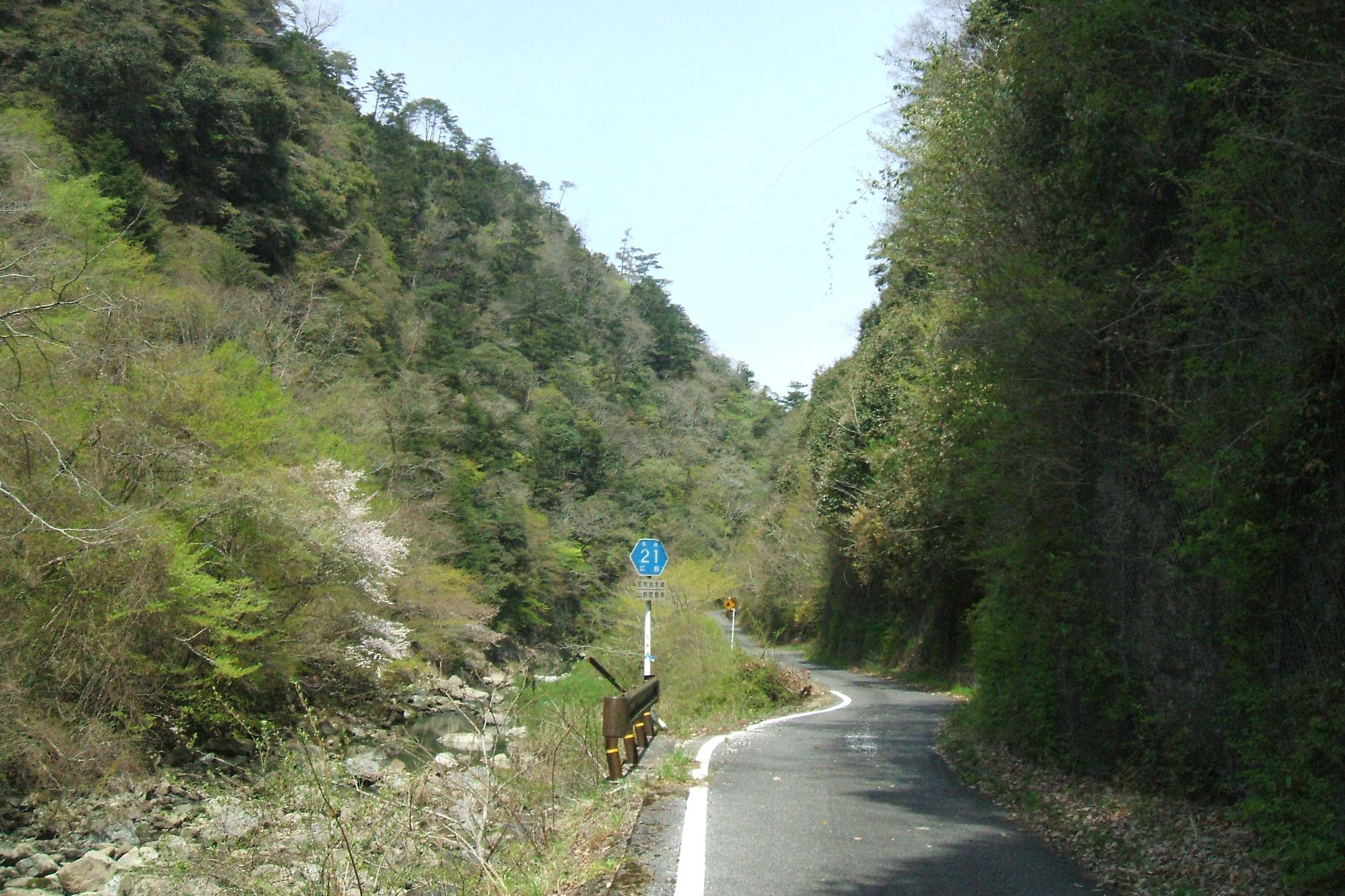 広島県福山市にある猿鳴峡（えんめいきょう）と広島県道21号線